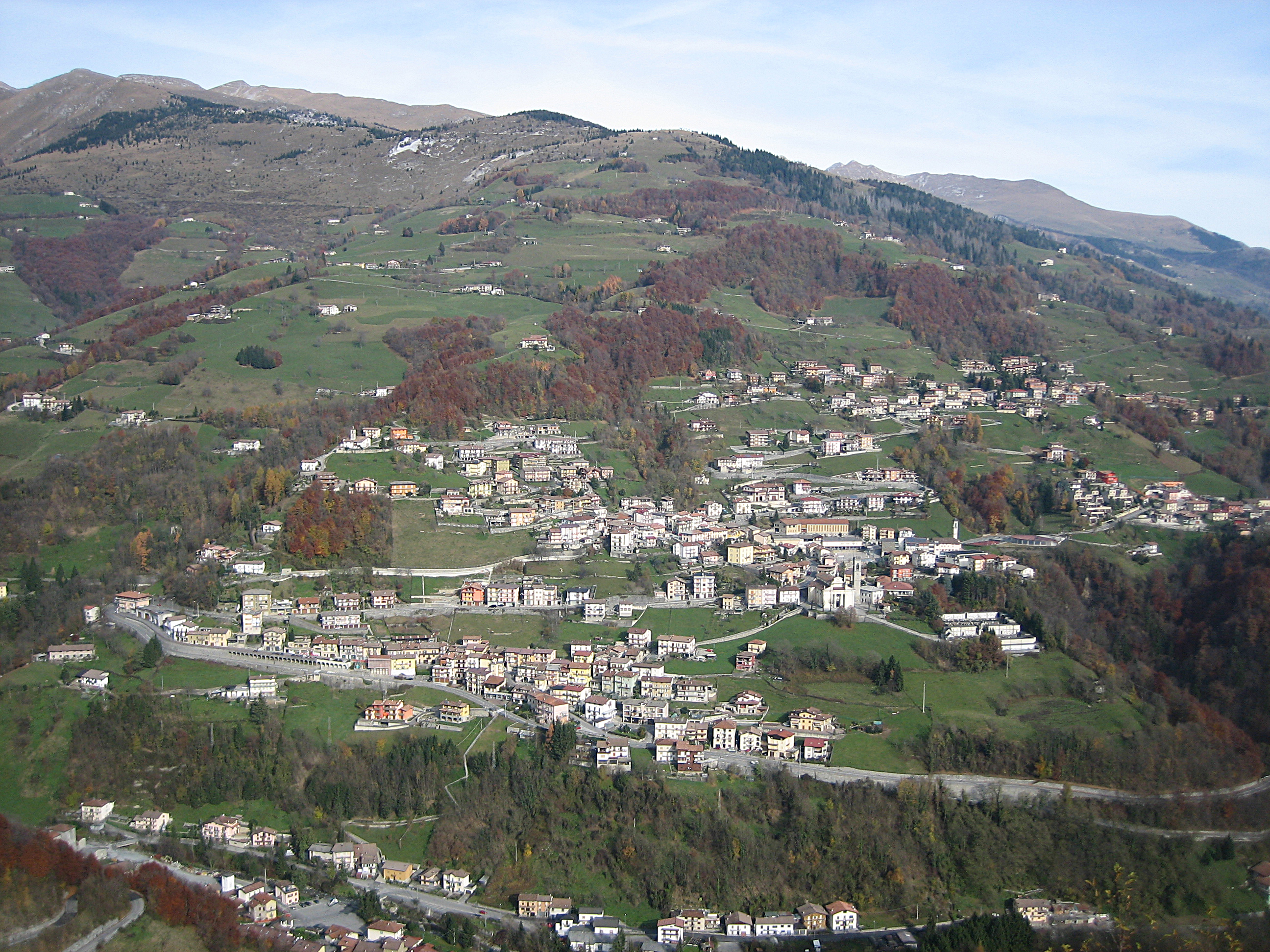 Panorama del paese di Gorno visto dal monumento del Cristo Re